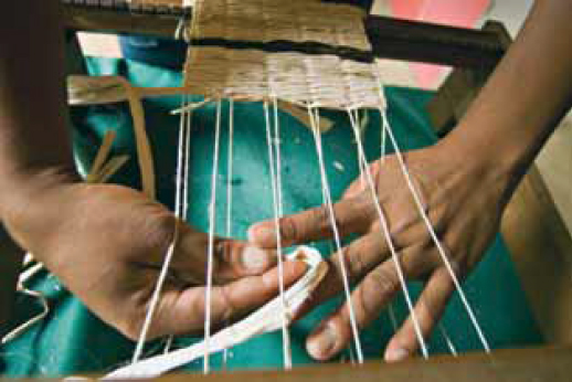 Artesanato de fibras de bananeira praticado no quilombo Ivaporunduva.